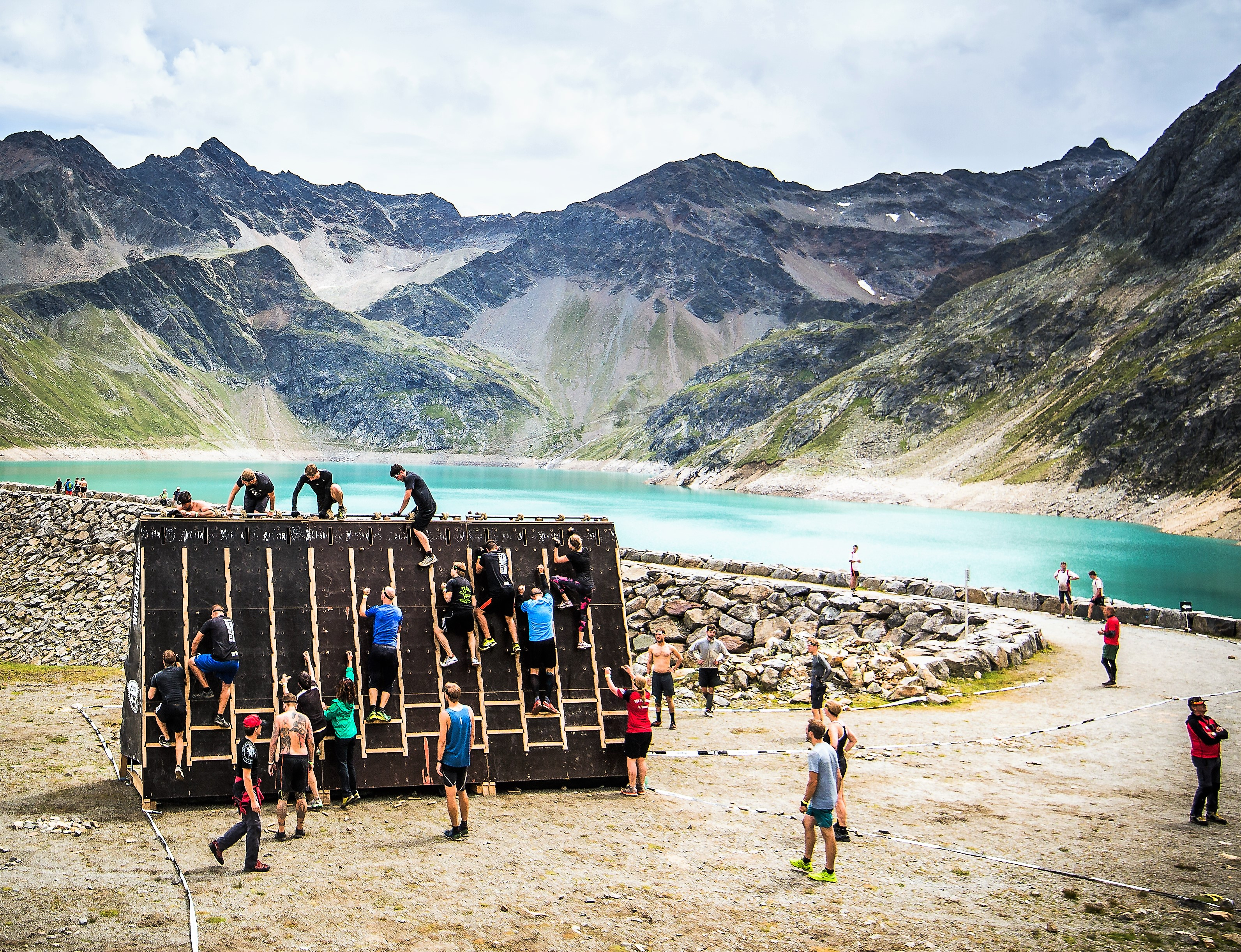 Kletterwand